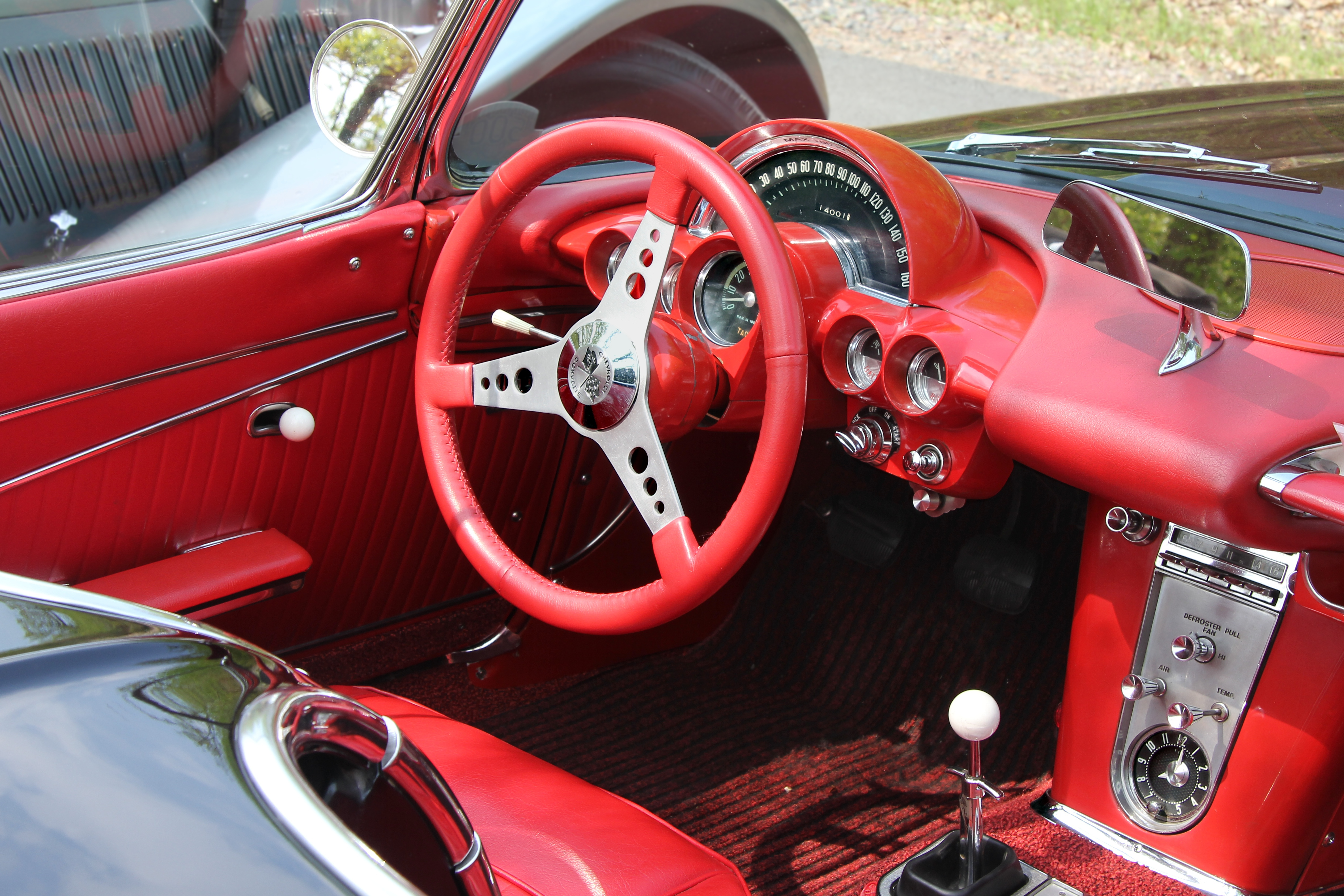 Cockpit eines Chevrolet Corvette, Baujahr 1962